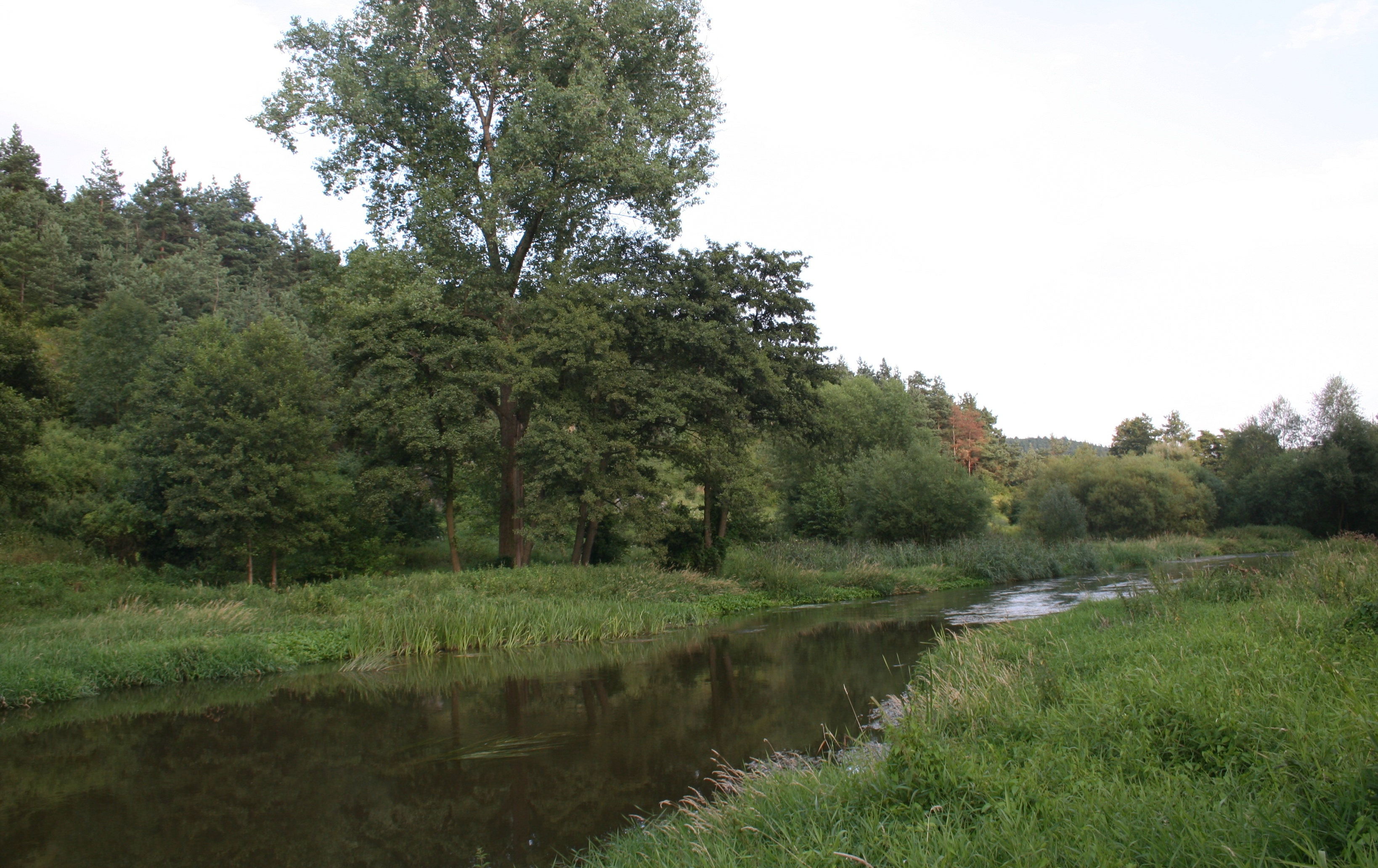 Warta w miejscowości Mstów , woj. śląskie